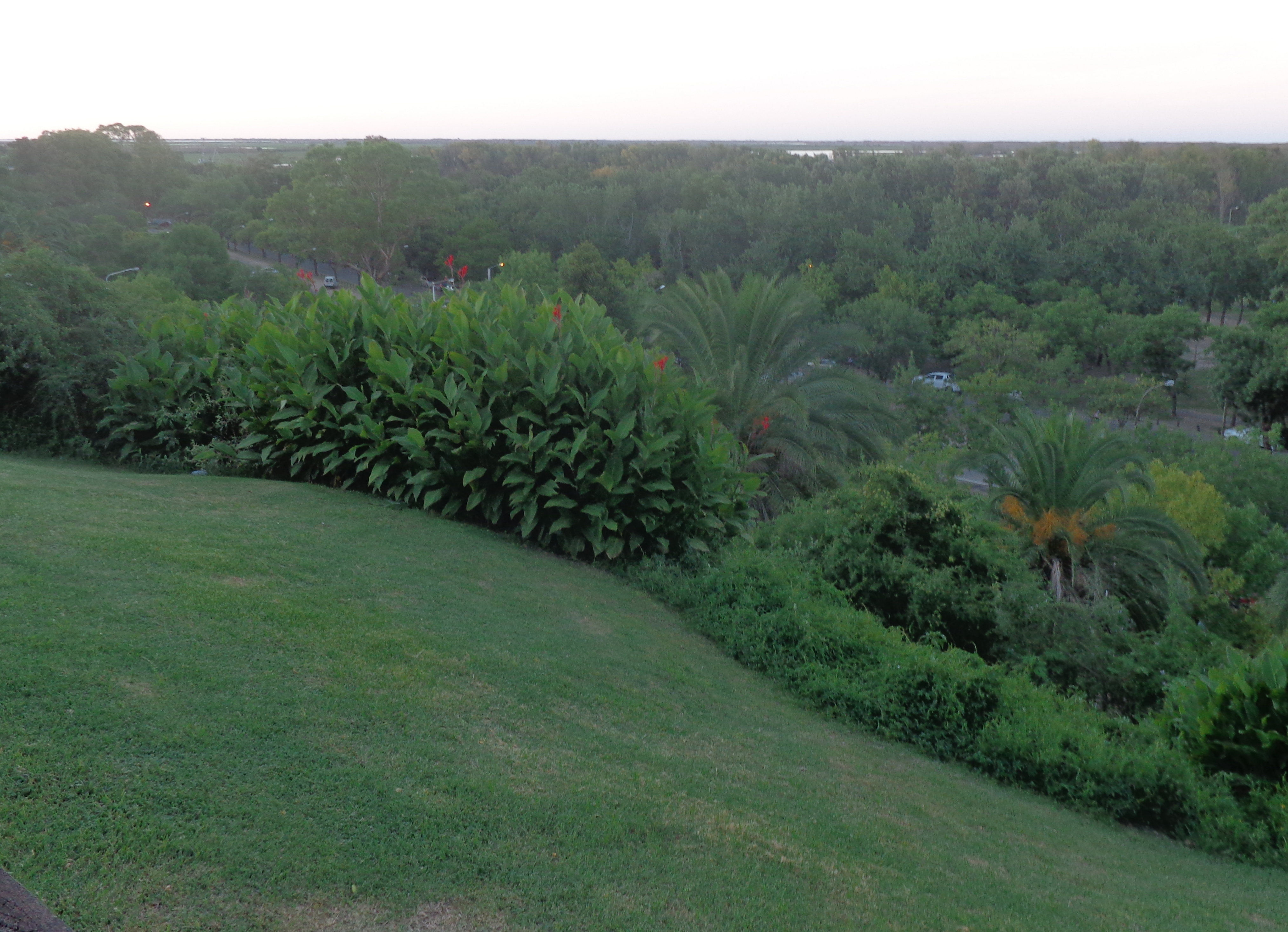 Costanera de San Pedro, Provincia de Buenos Aires, Argentina.